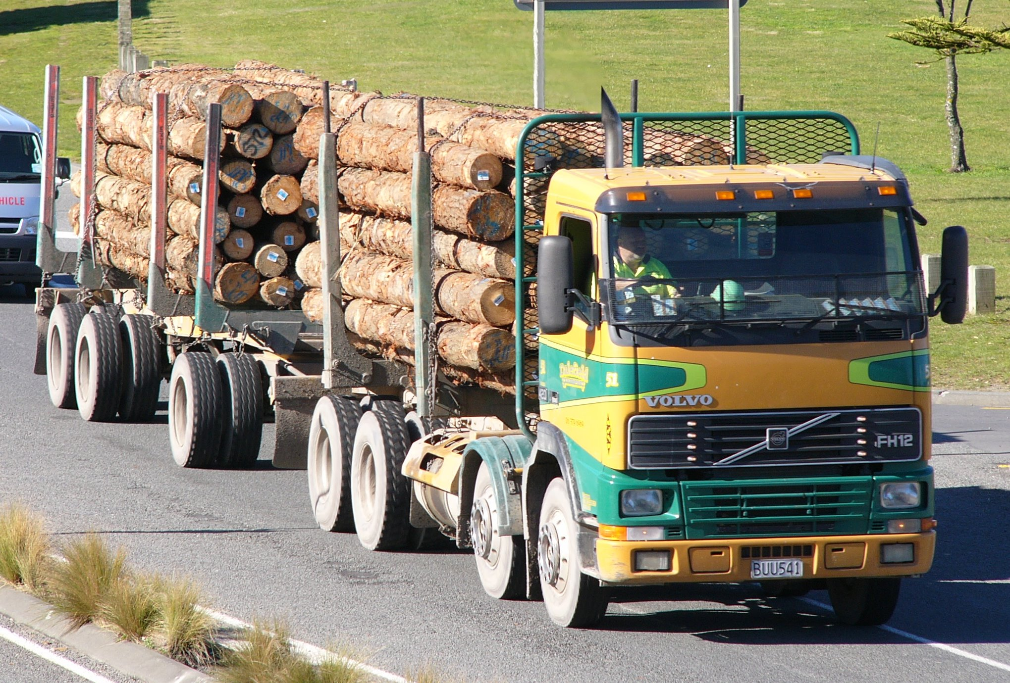 1997 Volvo FH12